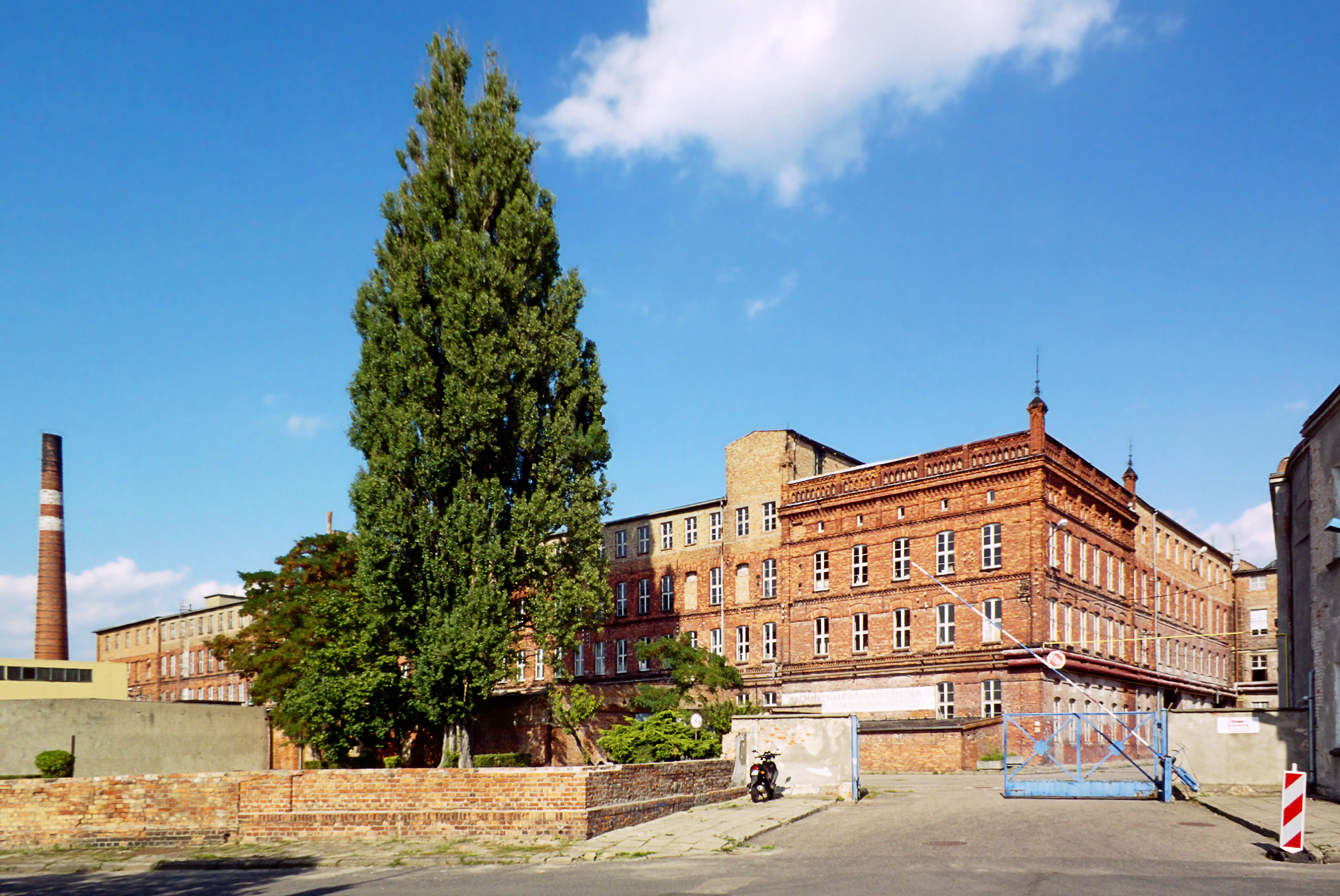 Chodzież, Budynek fabryki porcelany